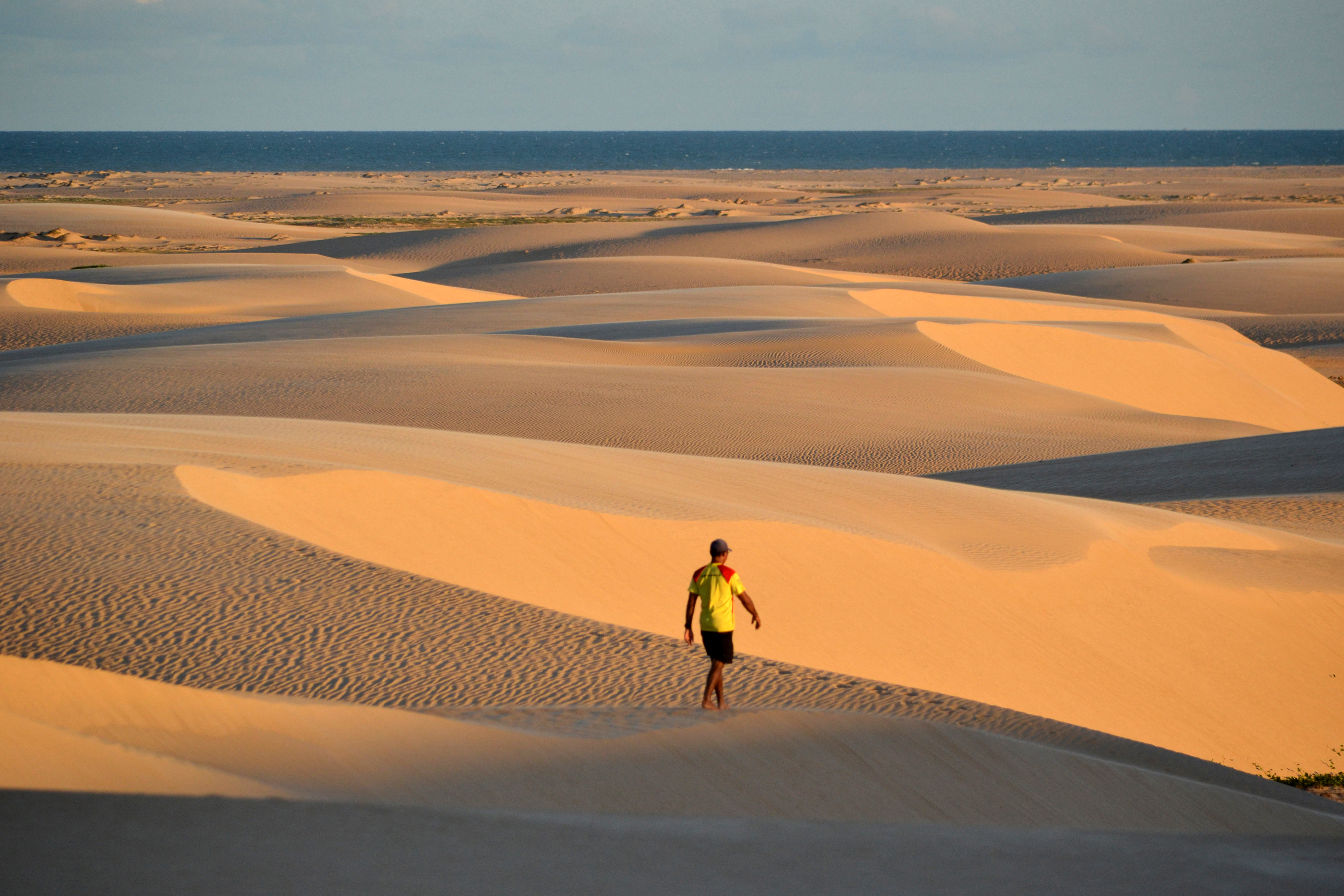 Descrição_para_sua_foto